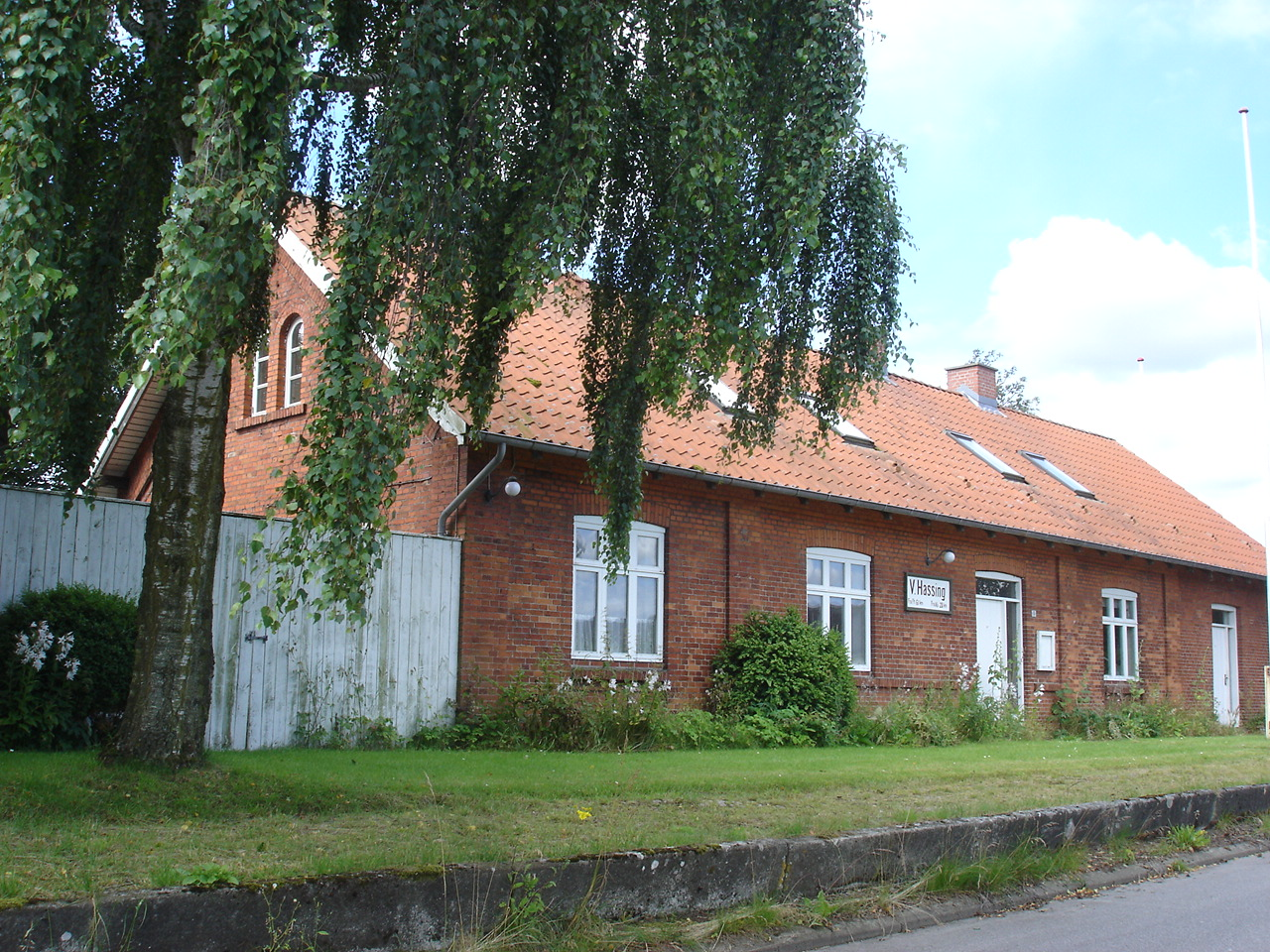 Vester Hassing Station fra sporside, velbevaret med perronkant, stationsskilt (V. Hassing Fra Fh 61 km Fra Ab 20 km), køreplantavle og de to rundbuede vinduer øverst i gavlen, som er karakteristiske for Aalborg Privatbaners stationsbygninger